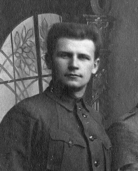 Kanstancin Jezawitau, białoruski działacz narodowy i wojskowy